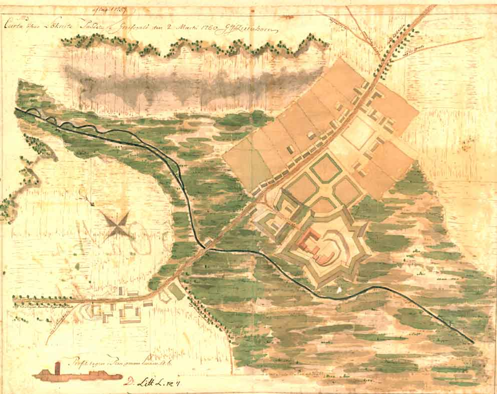 004 Tyskland. Löcknitz. Carta öfver Löknitz Passet. Aftagit 1759. Greifswald den 2. Martie 1760.